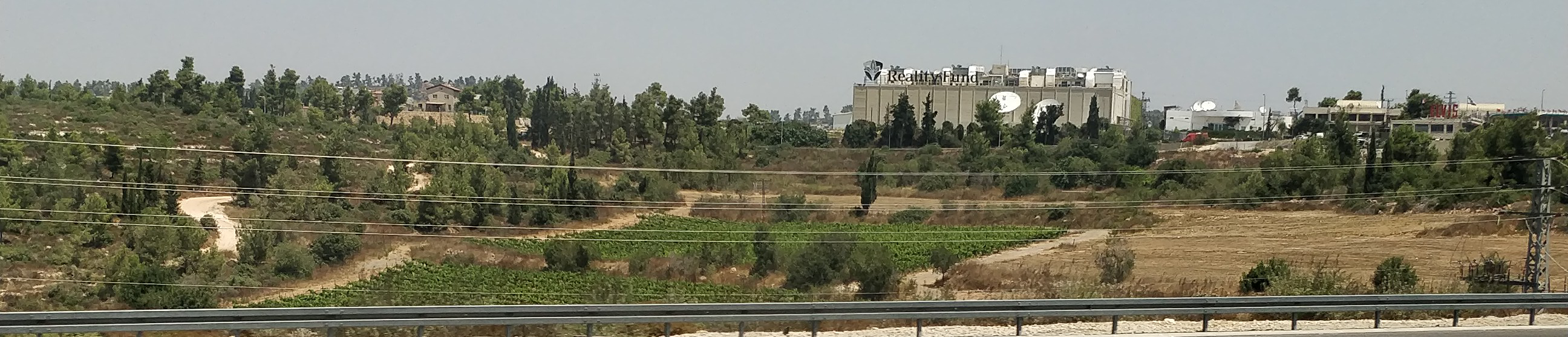 אולפני נווה אילן, אוגוסט 2019